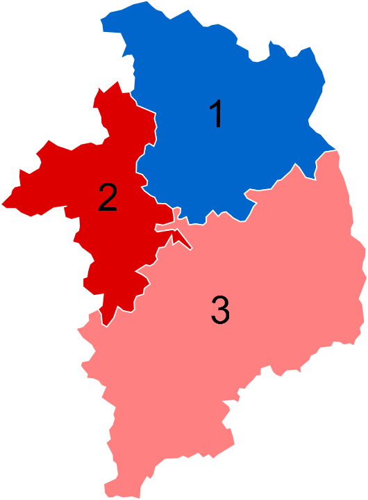 Résultats des élections législatives du Cher en 2012